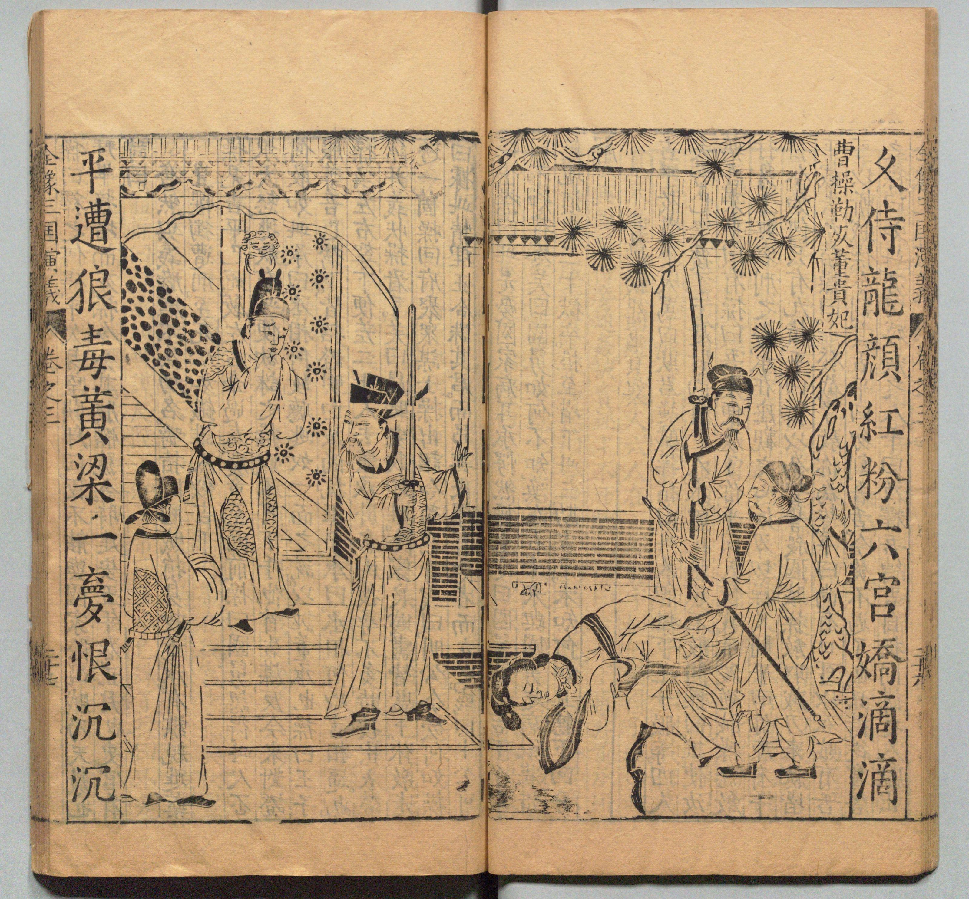 新刊校正古本大字音释三国志通俗演义 明万历十九年书林周曰校刊本